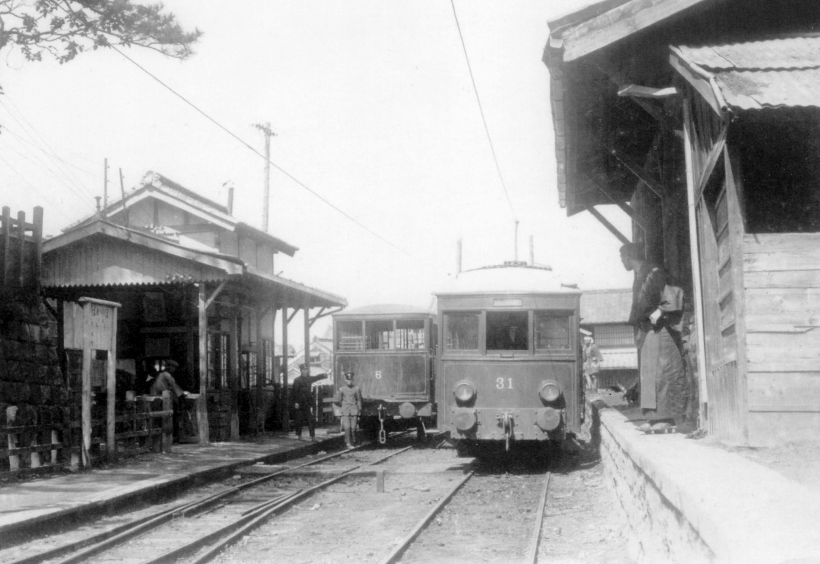 大正時代の堀川駅